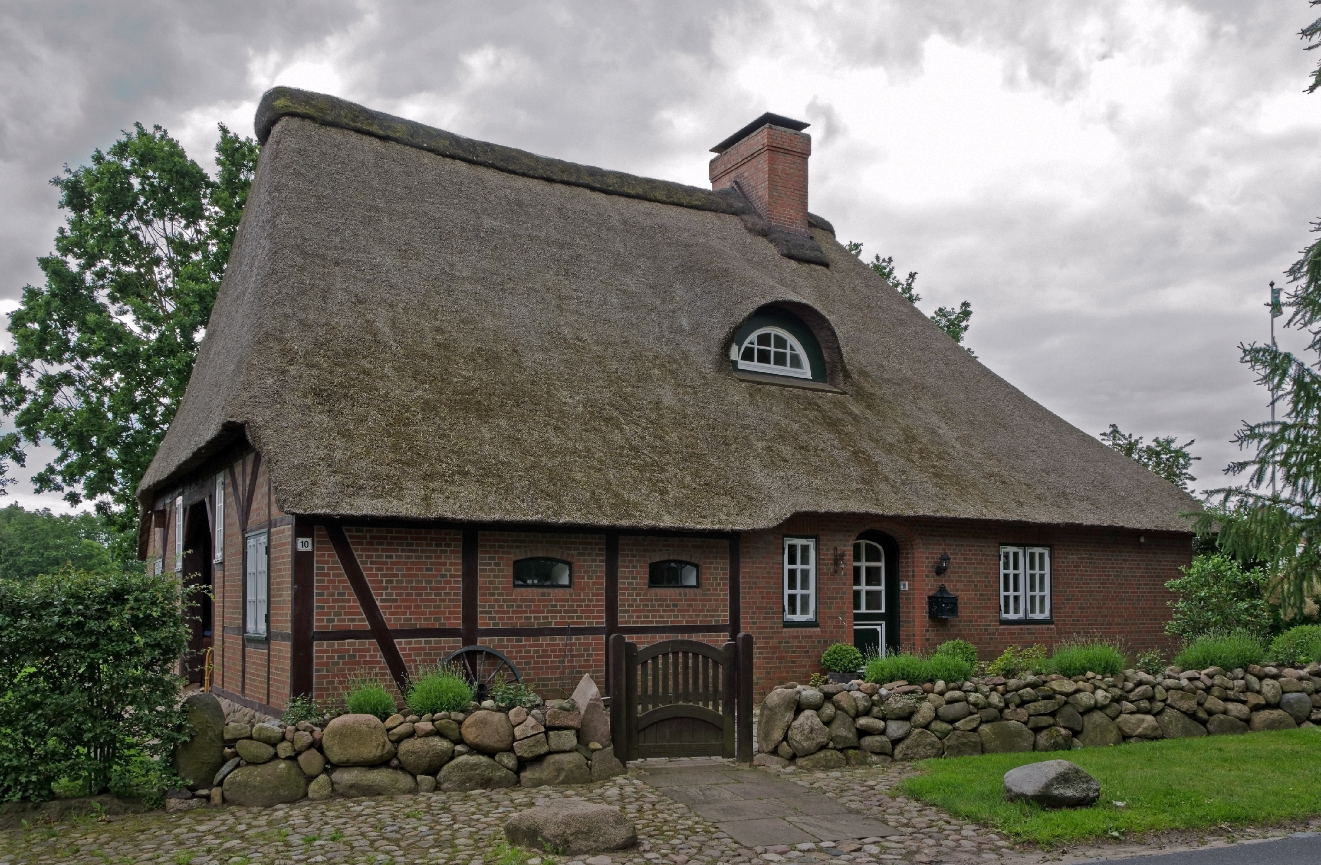 Borstel-Hohenraden Mühlenweg 10